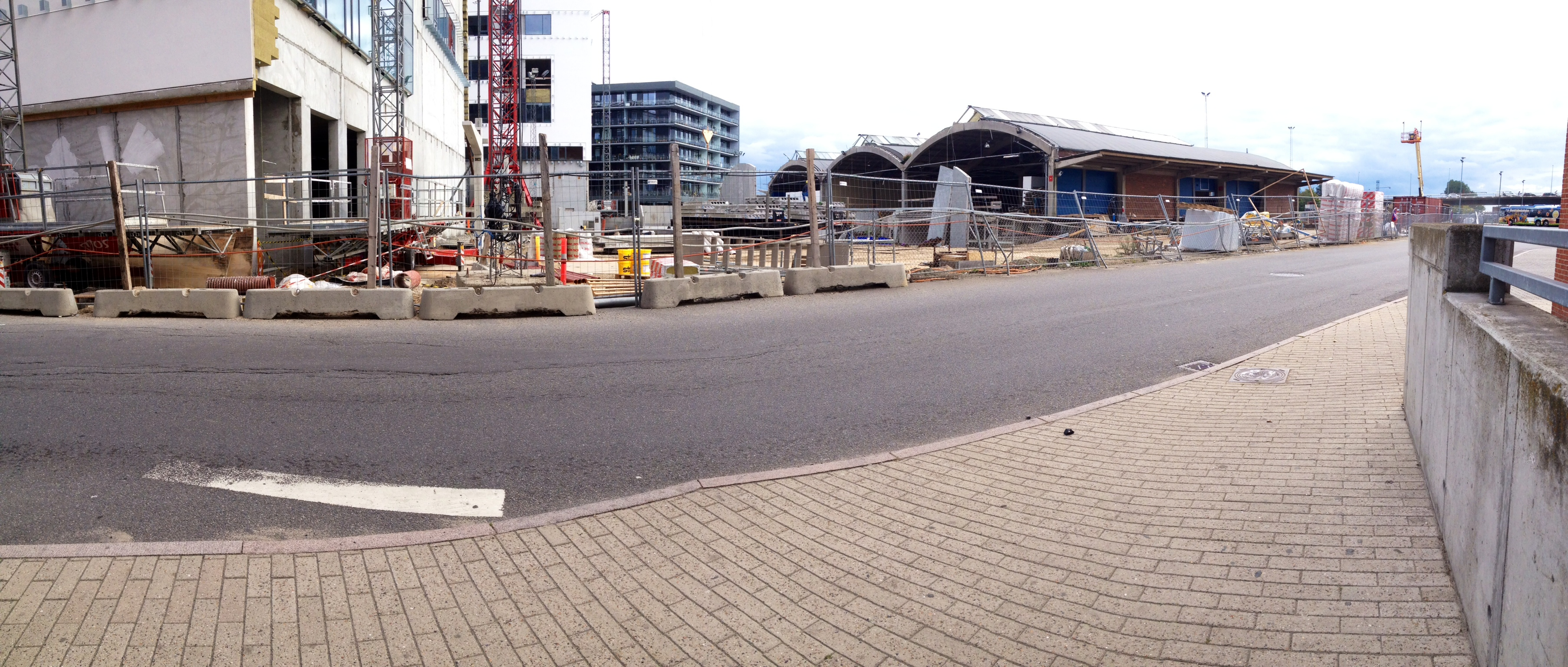 Panorama af Godsbanen fra Aalborg Busterminal